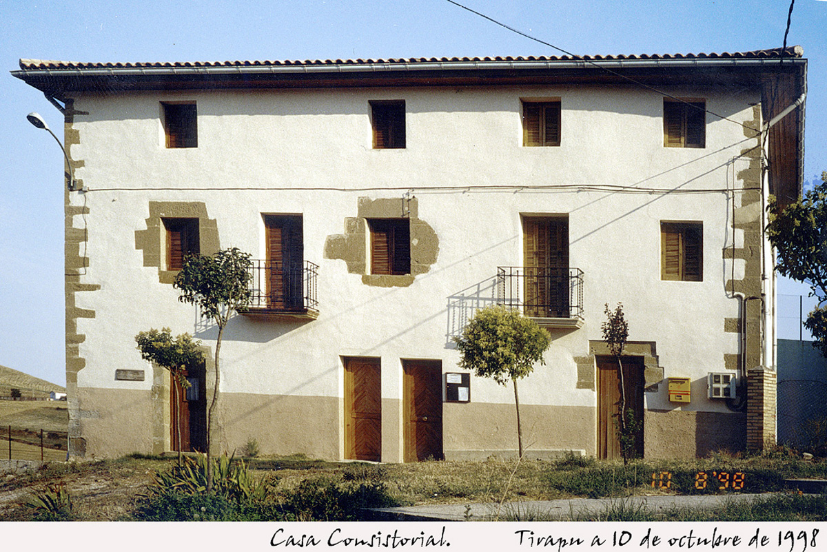 Casa consistorial. Antigua casa parroquial y del ayuntamiento. Actualmente en usos diversos: Archivo,biblioteca,Club social,oficinas de Alcaldia y ayuntamiento,salas multifuncionales para usos del pueblo.Etc.